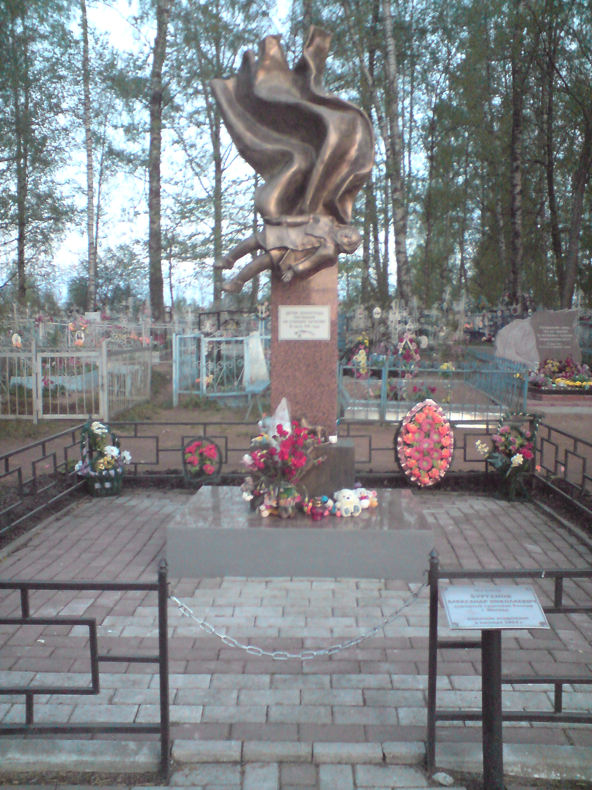 Памятник "Всем погибшим детям 1941-1945 гг.", установленный в с. Лычково Новгородской области. Скульптор А.Н. Бурганов.